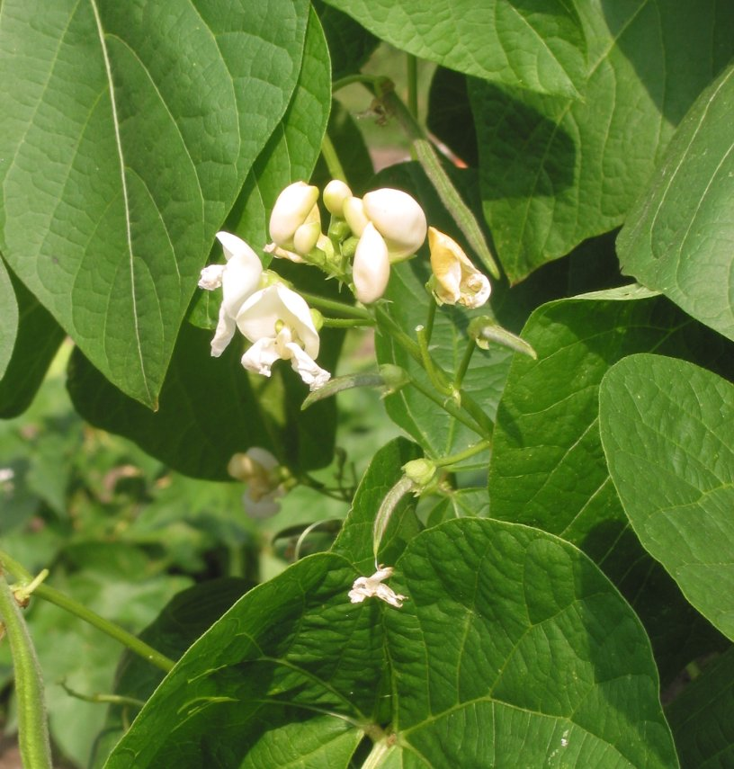 Bloeiwijze van pronkboon; begin augustus.